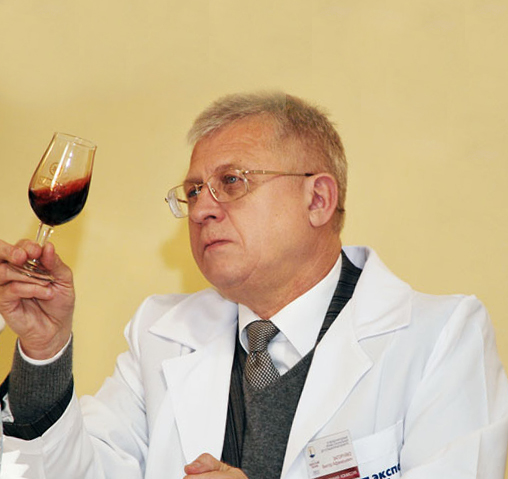 Международная выставка вина WinExpo